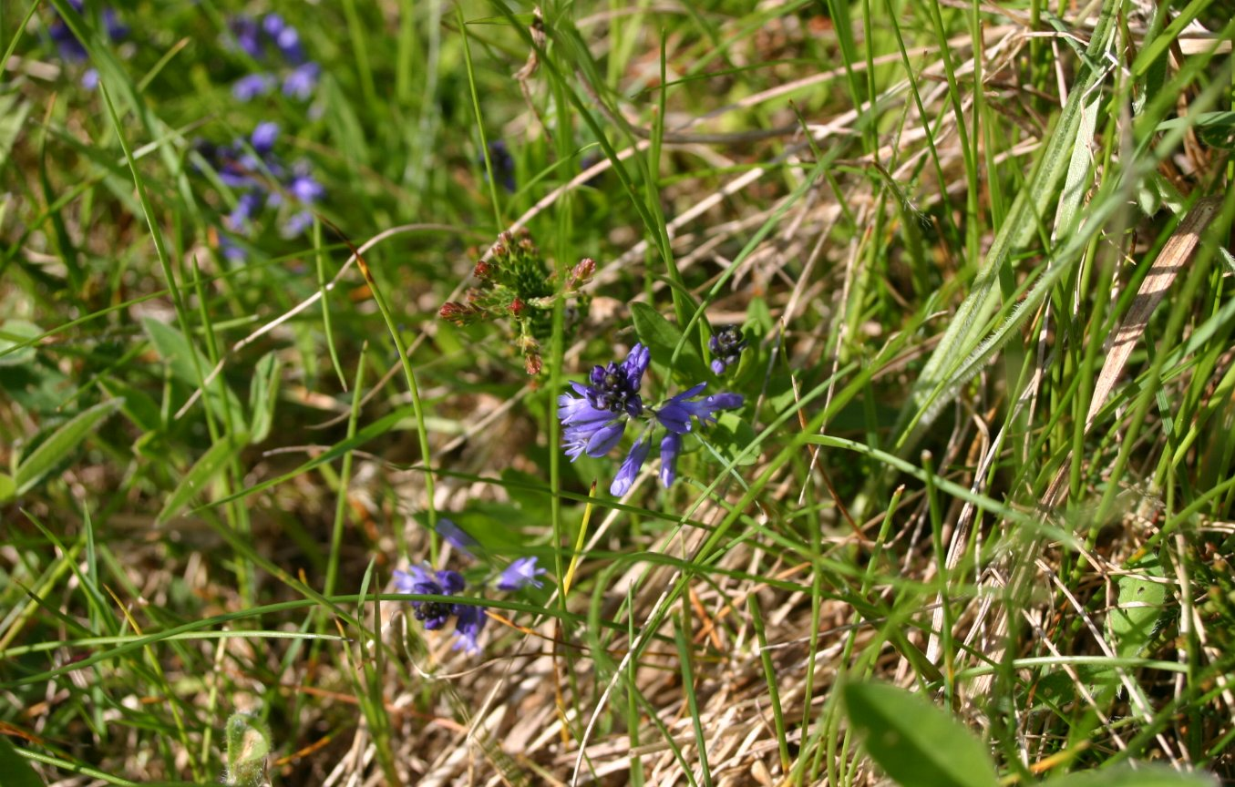 Polygala-serpyllifolia: Flowers.